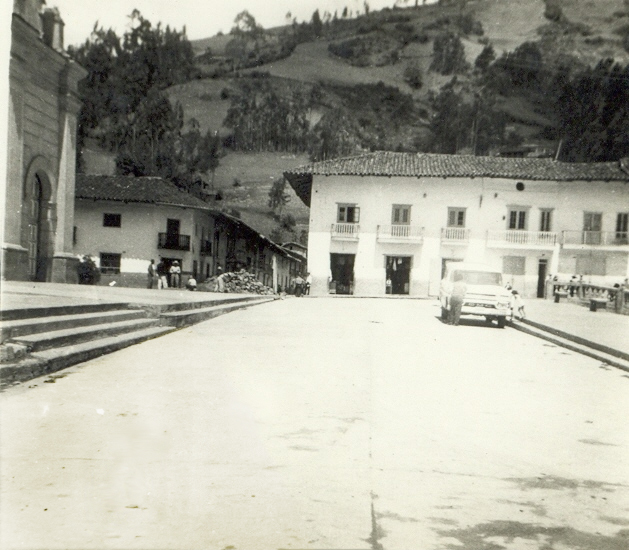 plaza de armas de San Miguel pavimentada